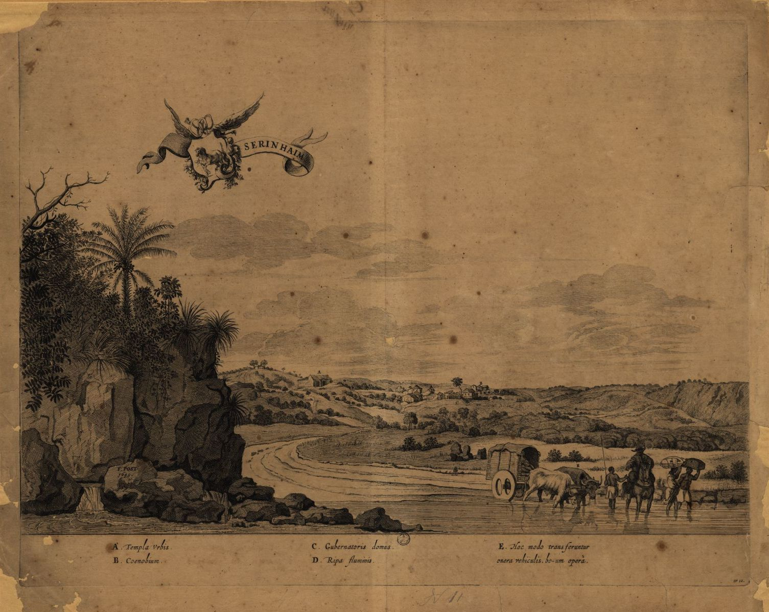 Iconografia de Sirinhaém, Pernambuco, de 1645, por Frans Jansz.